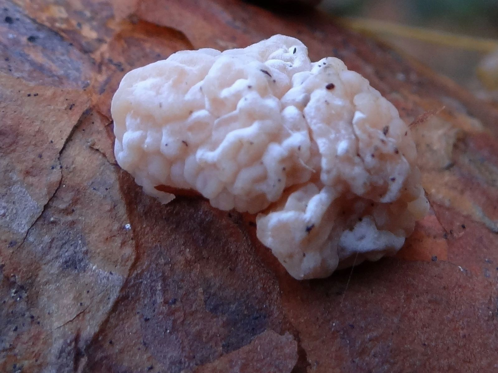 Tremella encephala